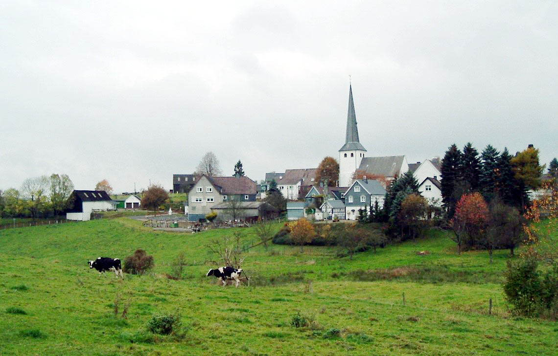 Der Ort Remlingrade in Radevormwald Fotografiert von Benutzer:Taube Nuss im Oktober 2004 "Lizenz: GNU FDL"